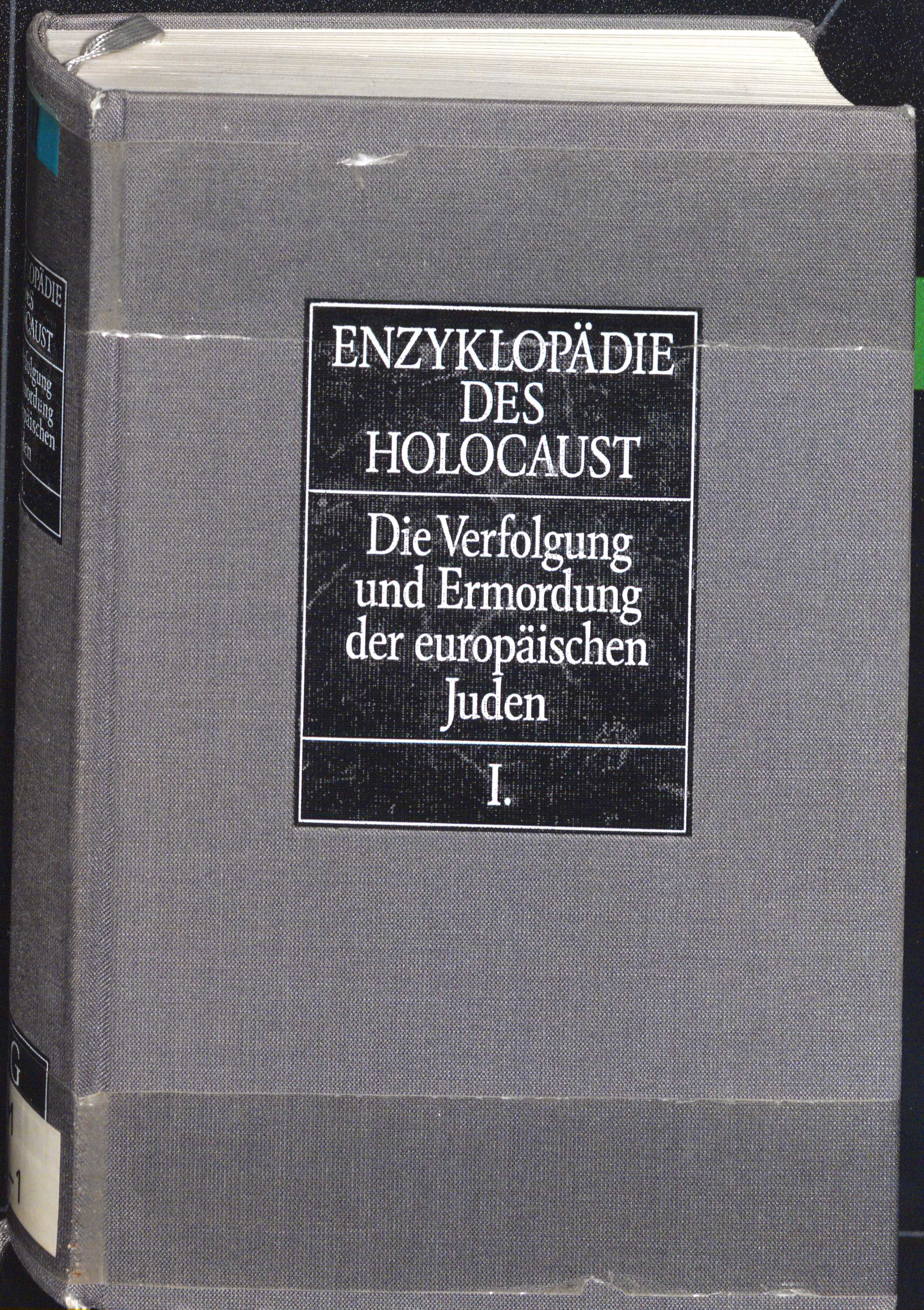 Enzyklopädie des Holocaust. Die Verfolgung und Ermordung der europäischen Juden Band 1, 1993